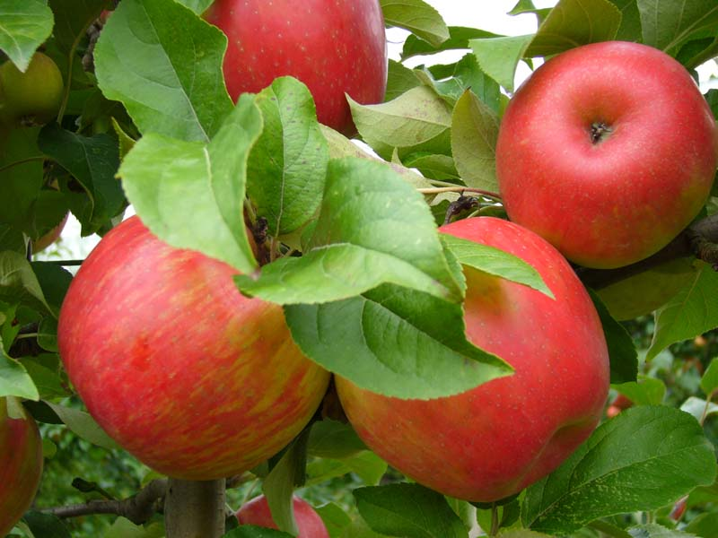 Pommes HoneyCrunch sur l'arbre